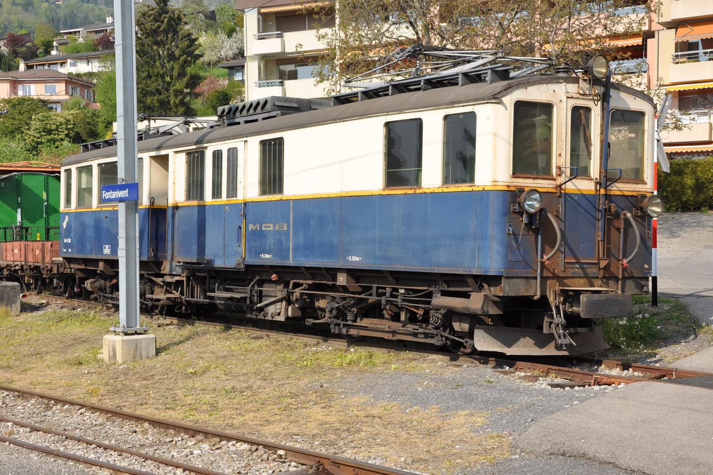 Gepäcktriebwagen De 4/4 28, ursprünglich CFZe 4/4 28, der Montreux-Berner Oberland-Bahn (MOB) in Fontanivent im April 2011.